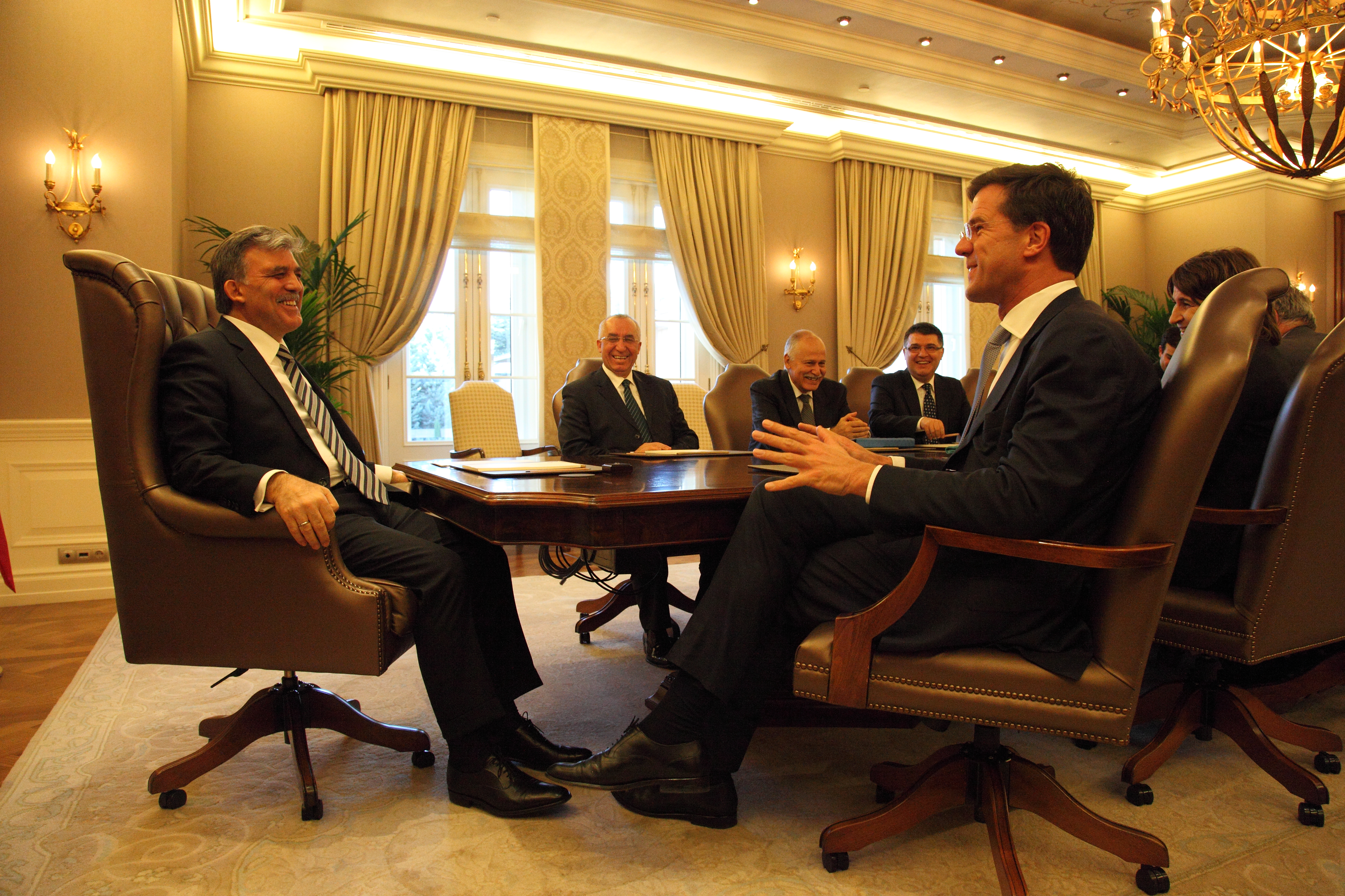 De Turkse president Gül ontvangt minister-president Rutte op zijn presidentieel paleis in Ankara.